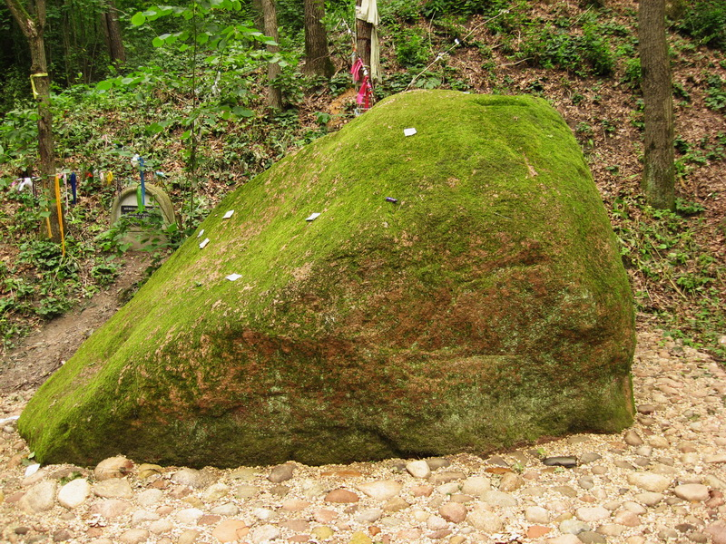 Нявесцін камень. Ашмянскі раён